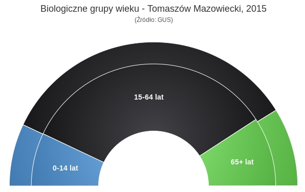 Bilogiczne grupy wieku, Tomaszów Mazowiecki, 2015